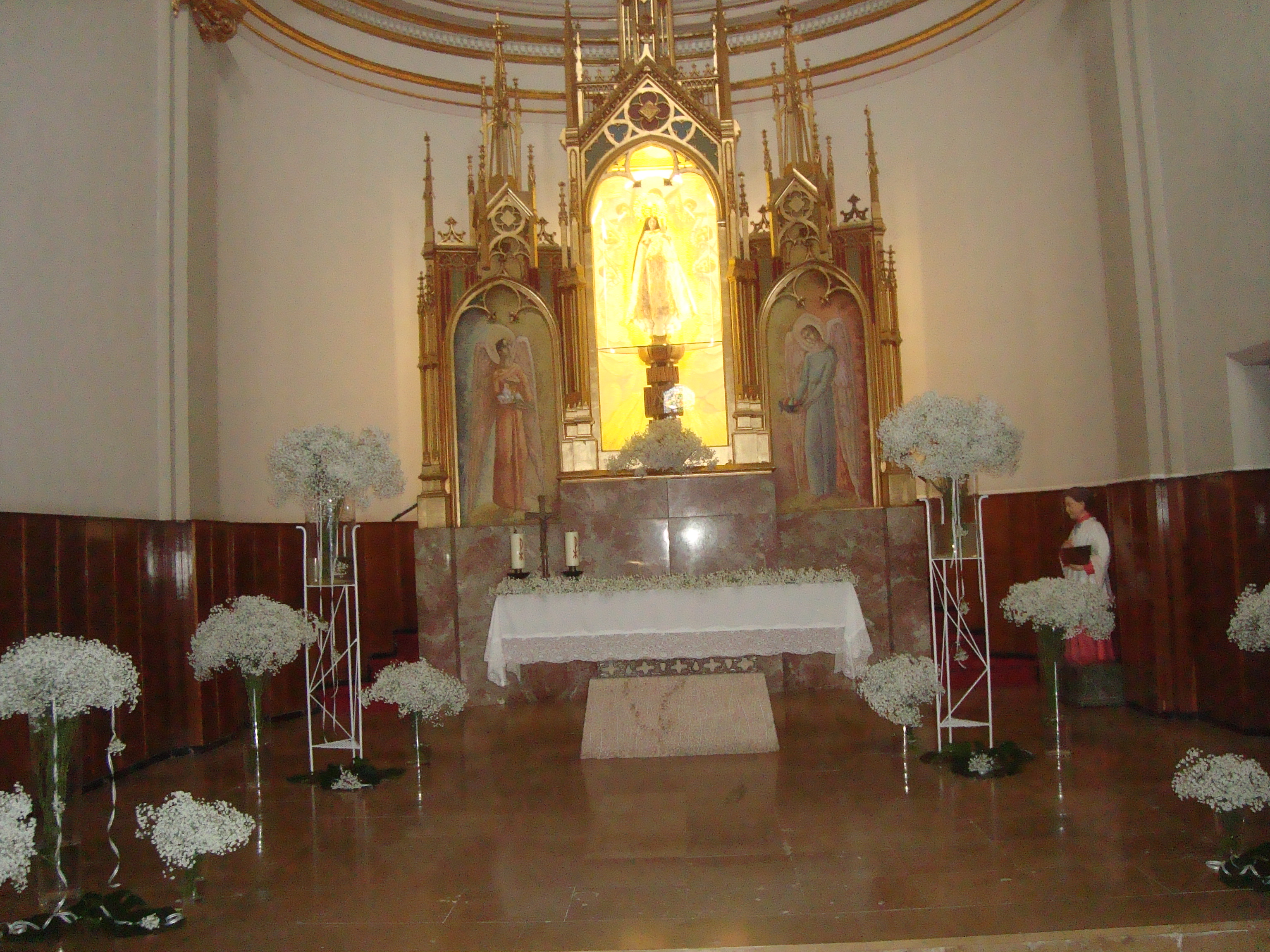 Ermita de la Mare de Déu del Remei (Alcanar)